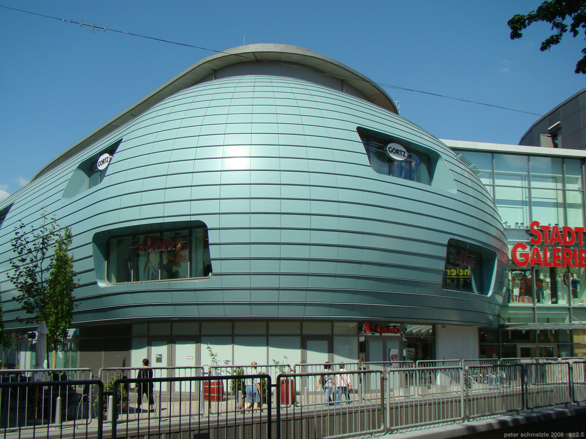 Stadtgalerie in Heilbronn, eröffnet im März 2008